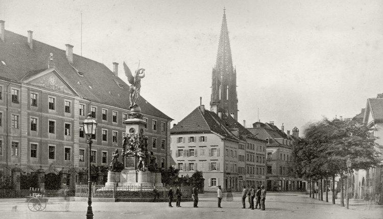 Photographie der Karlskaserne von 1844